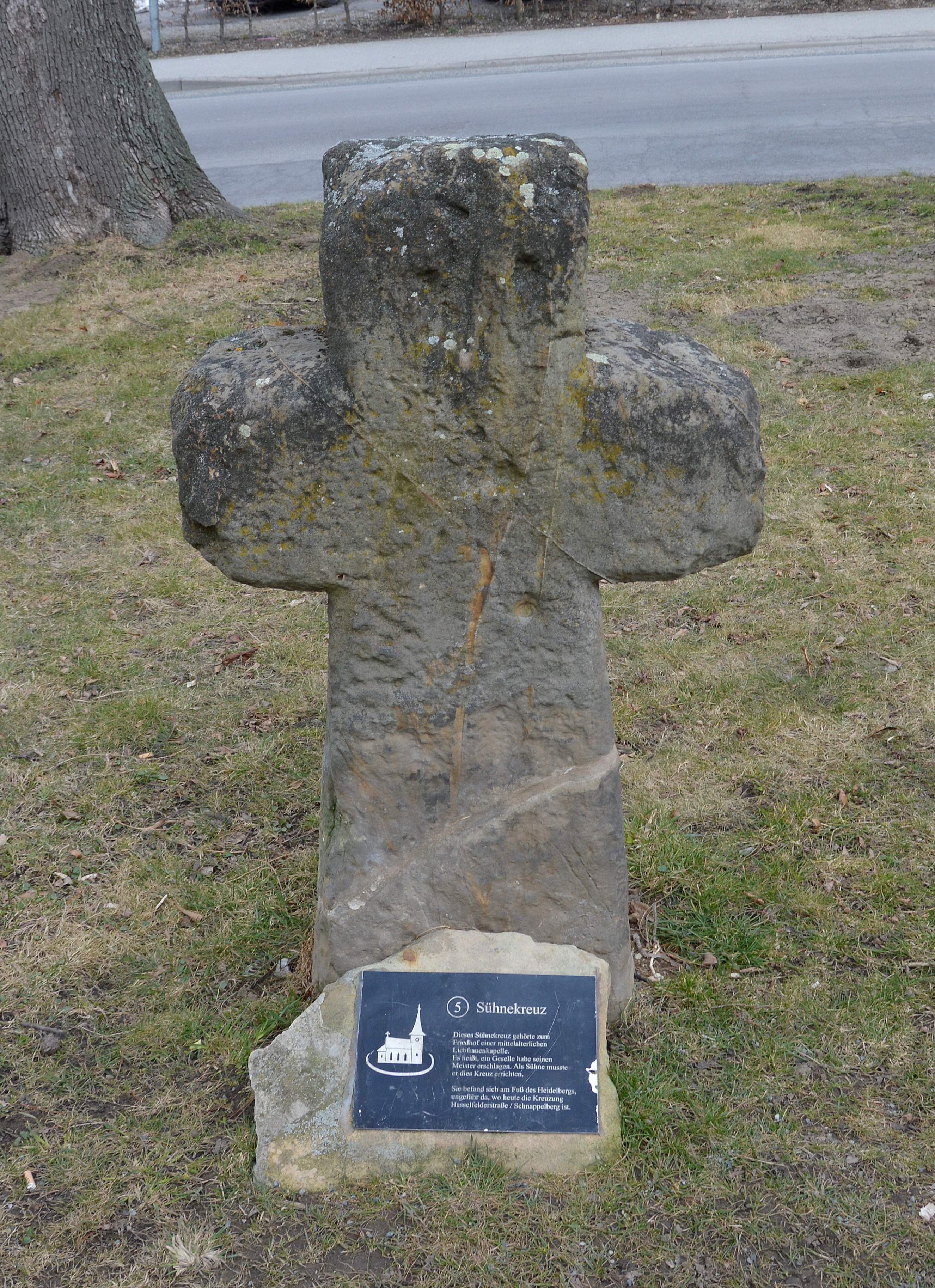 Sühnekreuz Schnapelberg in Blankenburg